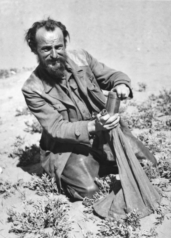 Tibetexpedition, Krause beim Bienenfangen Pennam, Krause beim Bienenfang Abgebildete Personen: Krause, Ernst: Mitarbeiter im Sven-Hedin-Institut, Deutschland